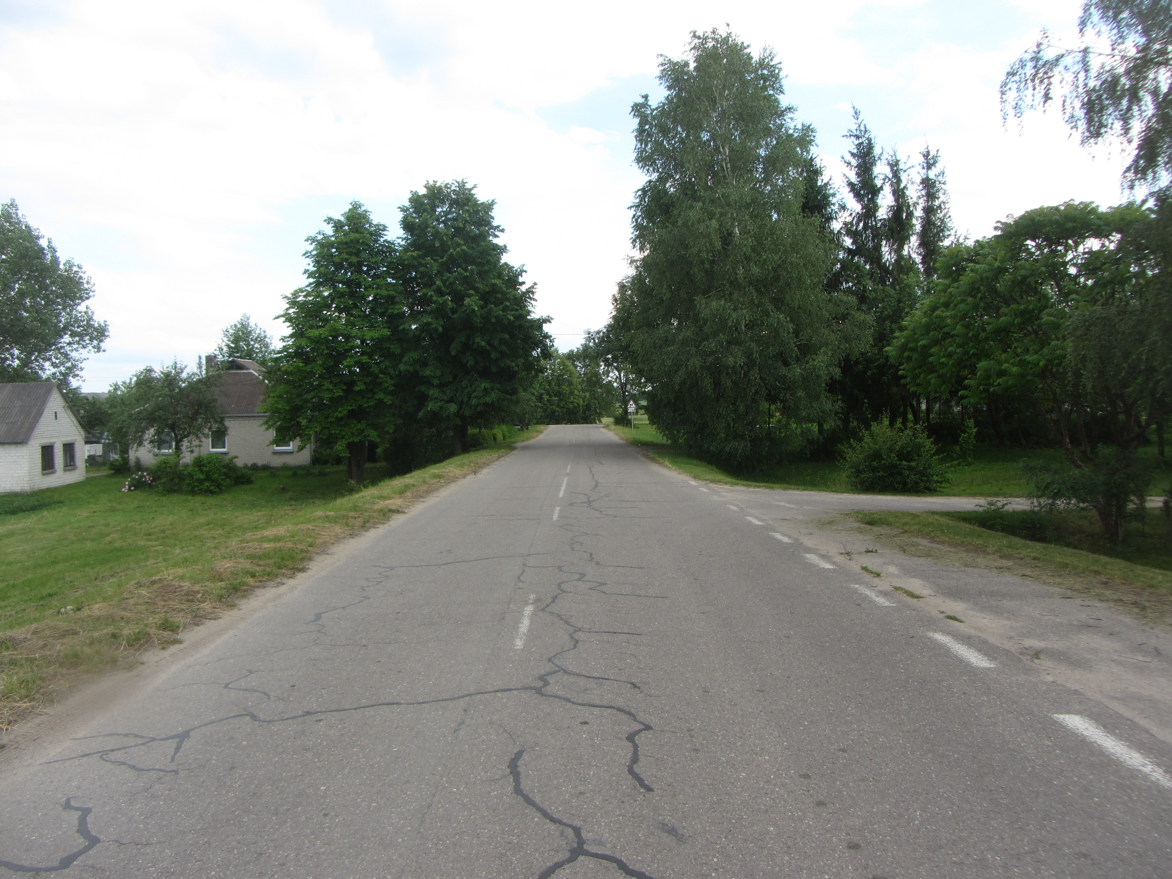 Kedonys, Lithuania